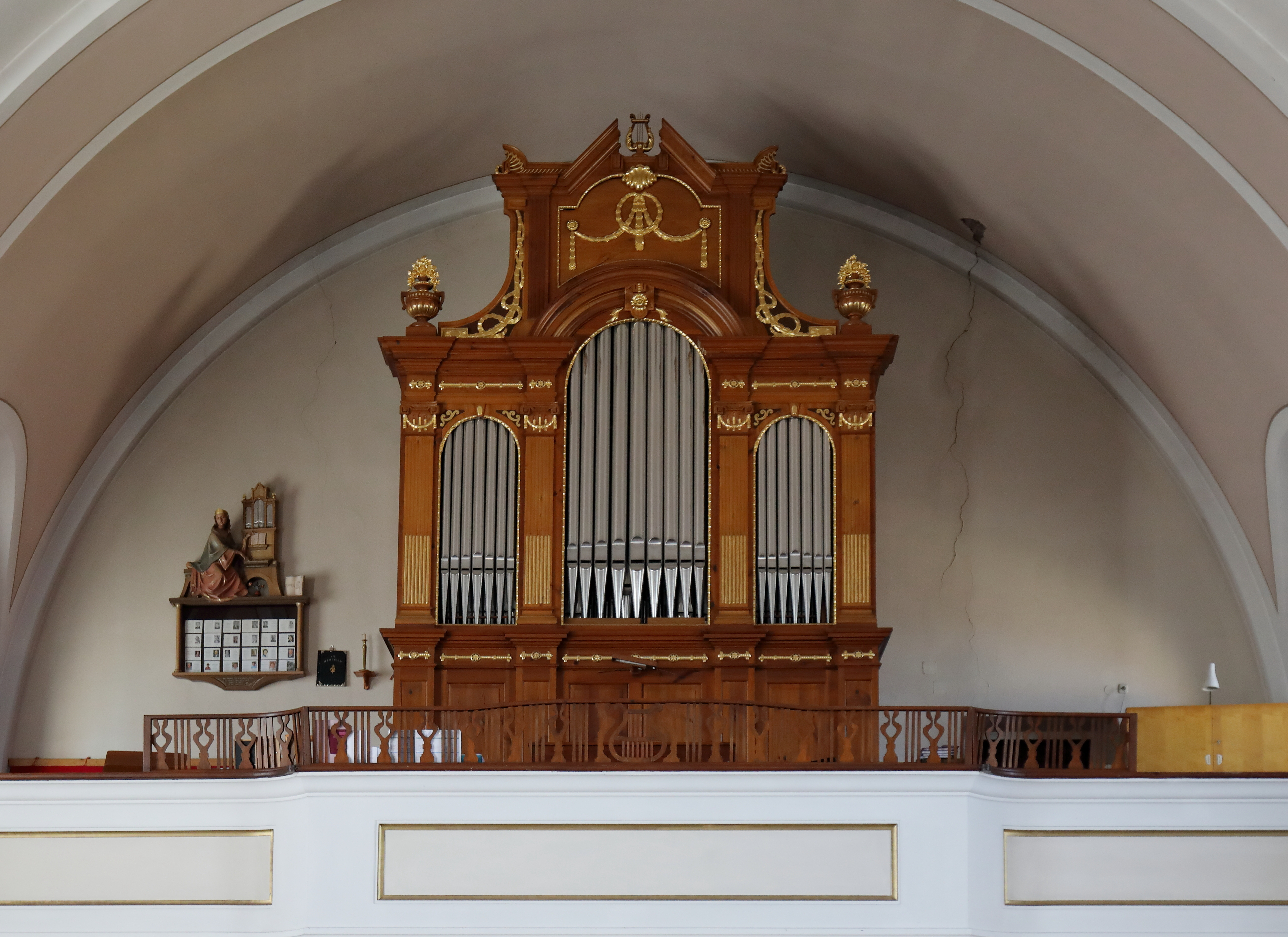 Orgel der röm.-kath. Pfarrkirche hl. Laurenz in der oberösterreichischen Gemeinde Schardenberg.Die Orgel wurde von den Gebrüdern Steininger in Obertrattnach als mechanische Orgel mit 19 Registern gebaut und am 28. Juni 1931 geweiht. Der Entwurf des Orgelgehäuses stammt von dem Ottensheimer Bildhauer Simon Rabeder (1862–1941).